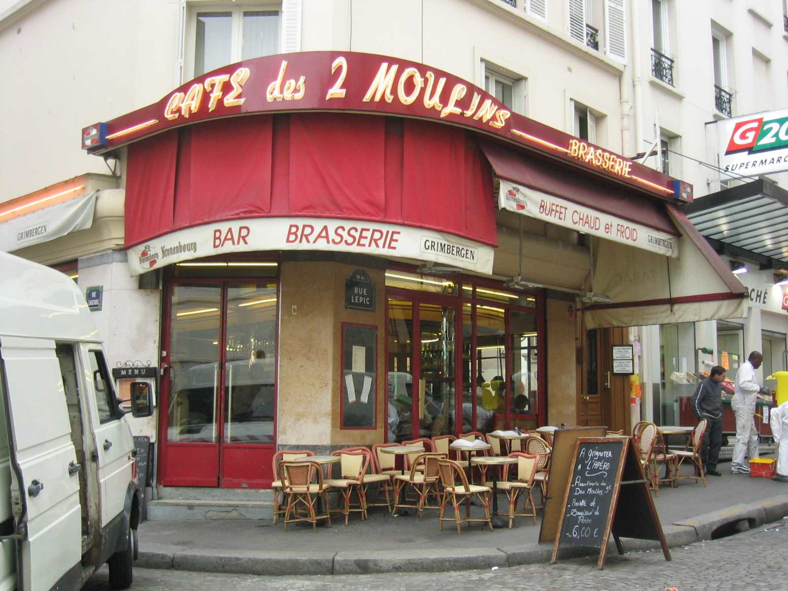 Il Café des 2 Moulins in Montmartre dove Amélie Poulain (Il favoloso mondo di Amèlie) lavora come cameriera. Parigi.